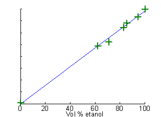 kalibrerinbgskurve for kvantifisering av etanol